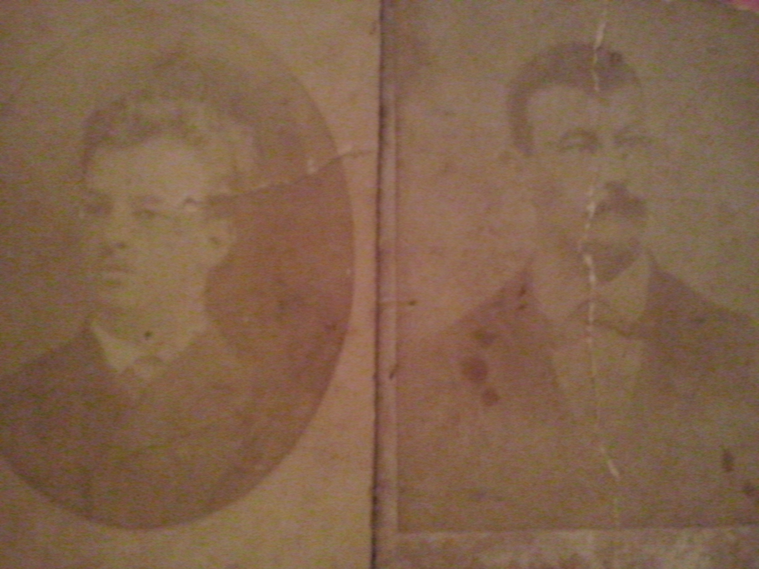 Fotografia de dois filhos de Gustave Rumbelsperger: Ernesto e Leopoldo